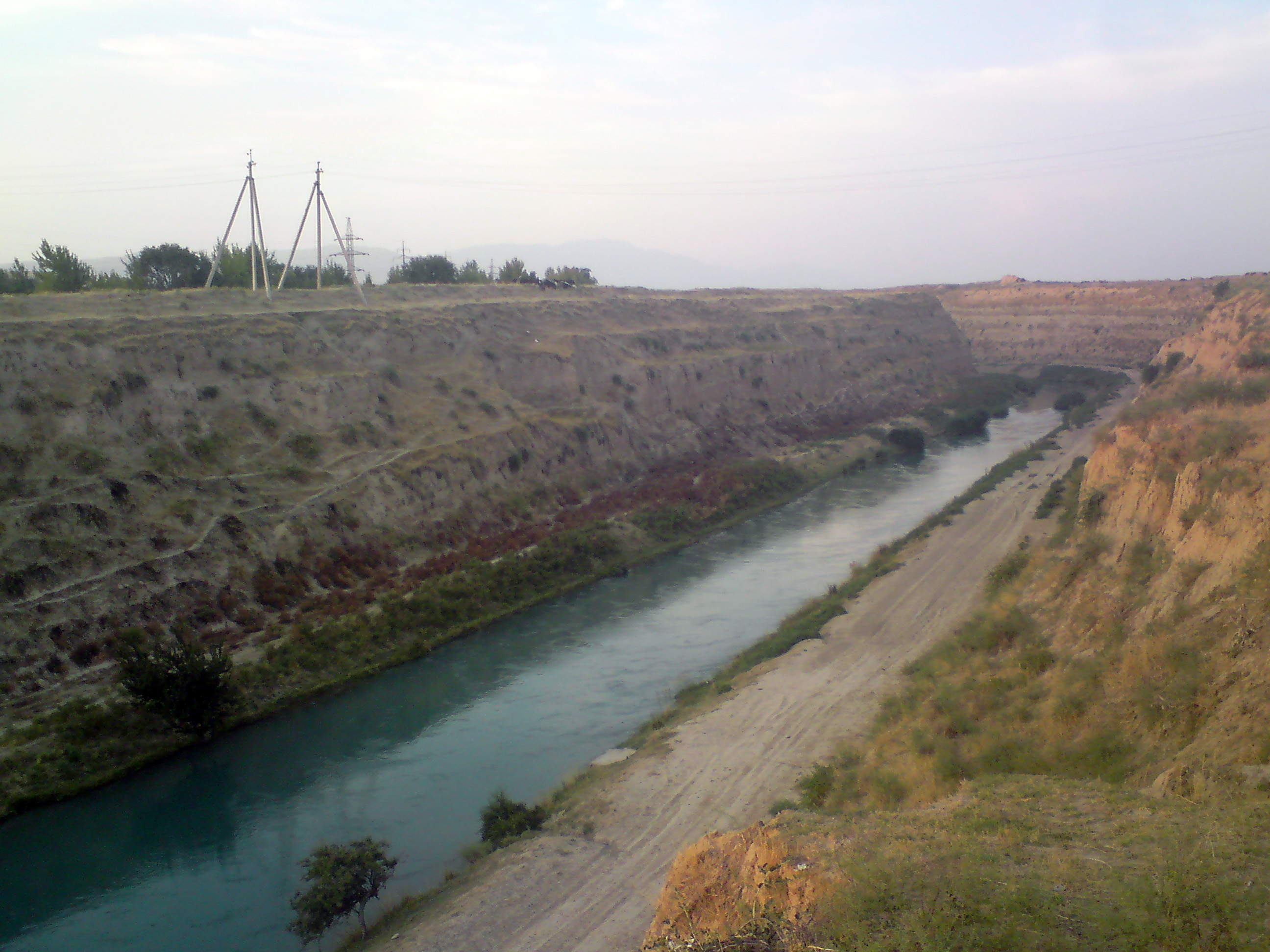 Канал Келесский, северная окраина города Чирчик, Ташкентский вилоят